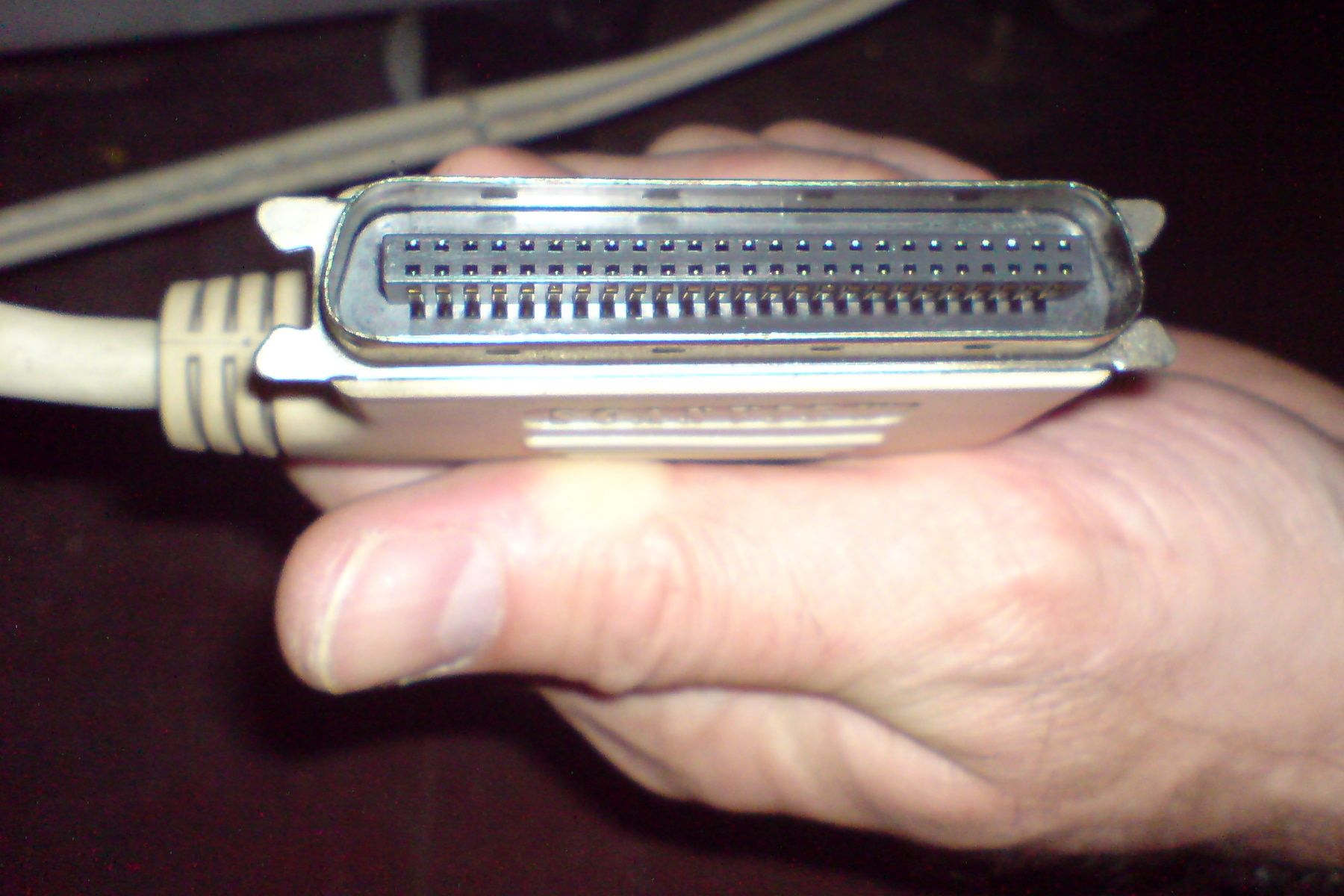 wtyczka Centronics 50-pin na kablu SCSI-2